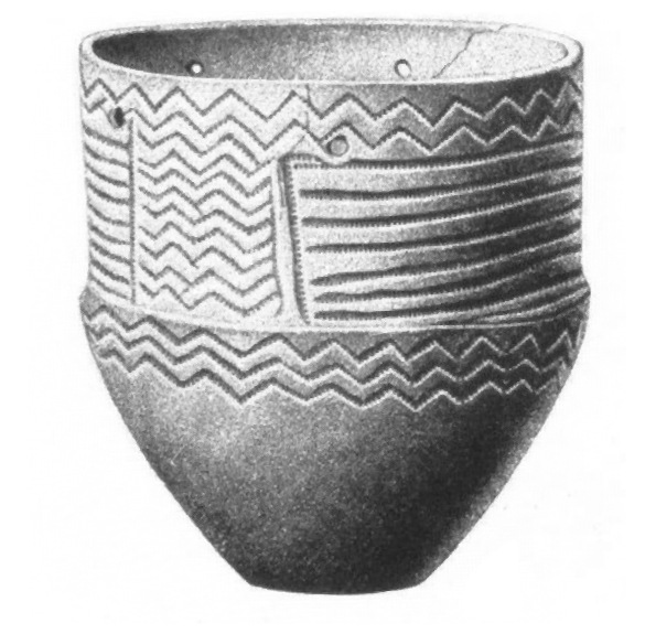 Gånggriftskeramik, funnen i Skåne